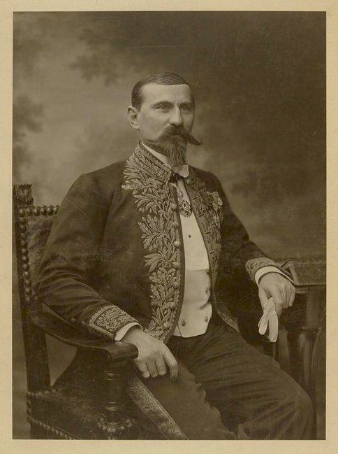 Emile Gentil, nommé Commissaire Général du Congo français en 1902, photographié par Nadar